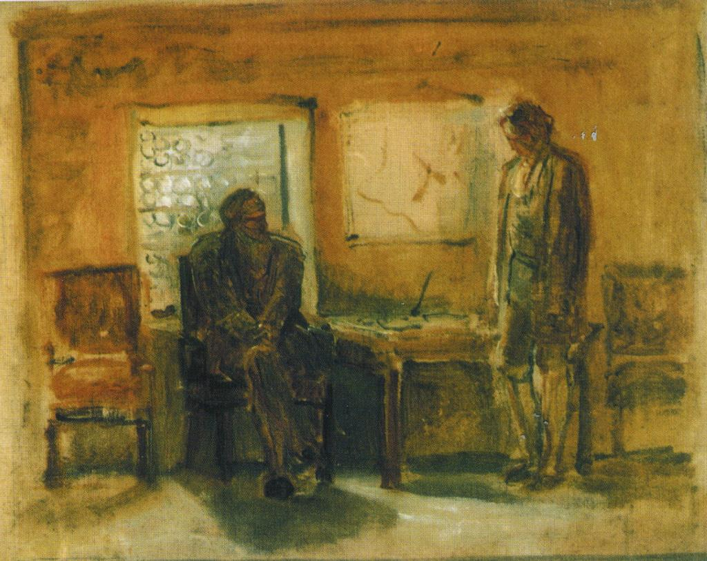 Петр I допрашивает царевича Алексея/ Эскиз